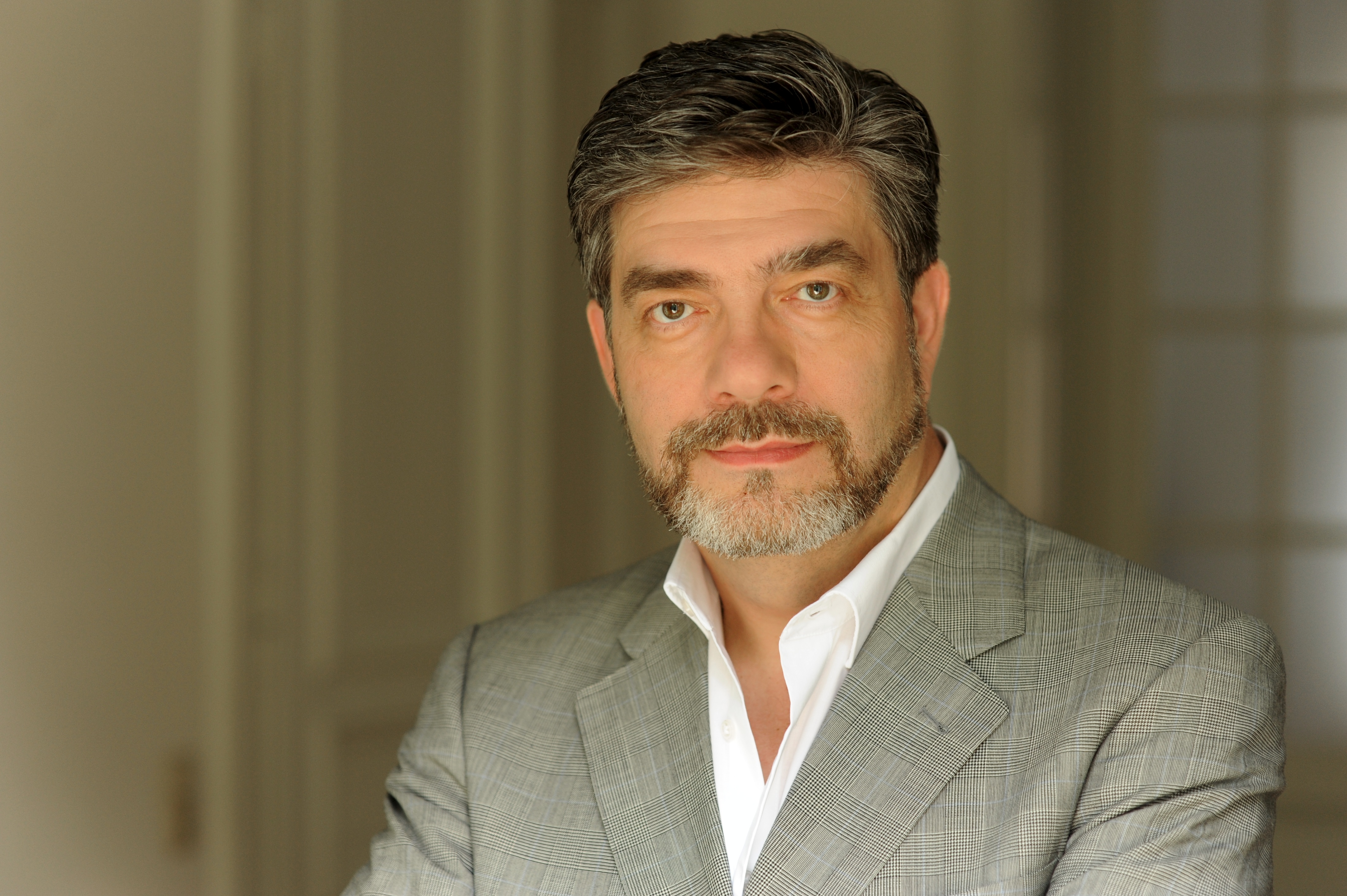 Portrait des Sängers Franz-Joseph Selig